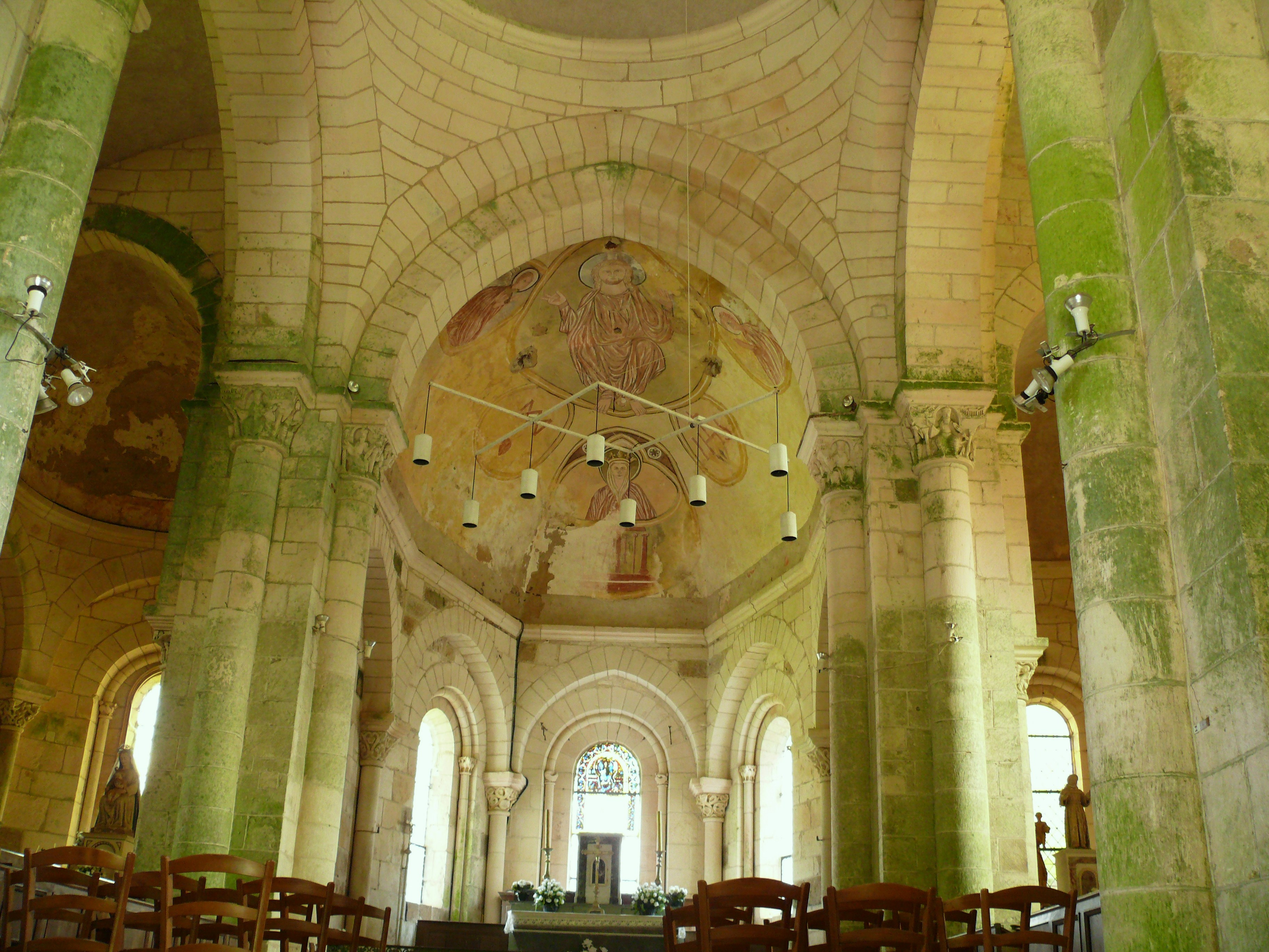 Gargilesse-Dampierre - Eglise Notre-Dame - Abside et absidioles